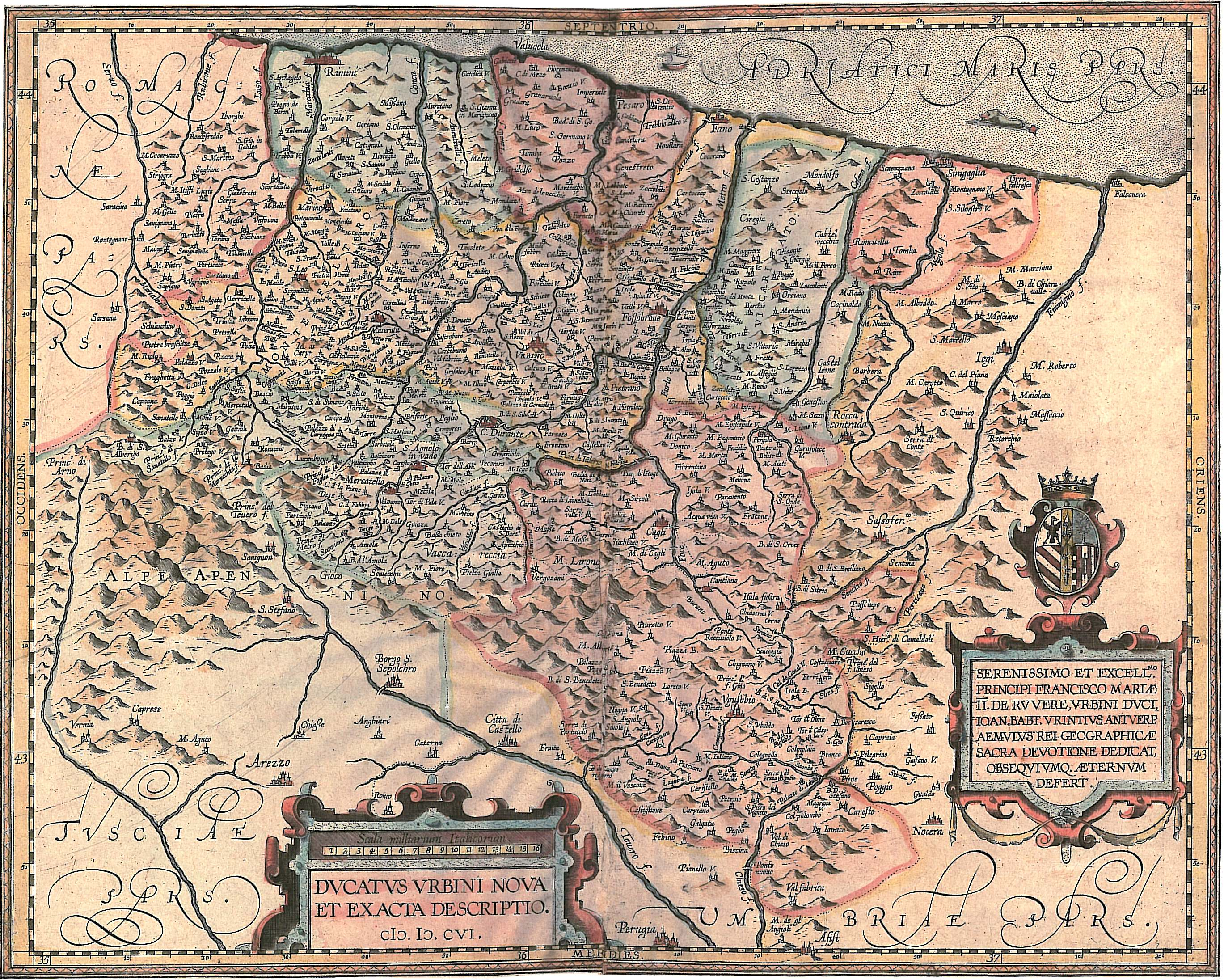 Ducatus Urbini Nova Et Exacta Descriptio, 1606 - Giovanni Battista Urintsedita in Theatrum Orbis Terrarum di Abramo Ortelio, Anversa, 1608, Duisburg(mm 381x487, Cartoteca storica delle Marche)